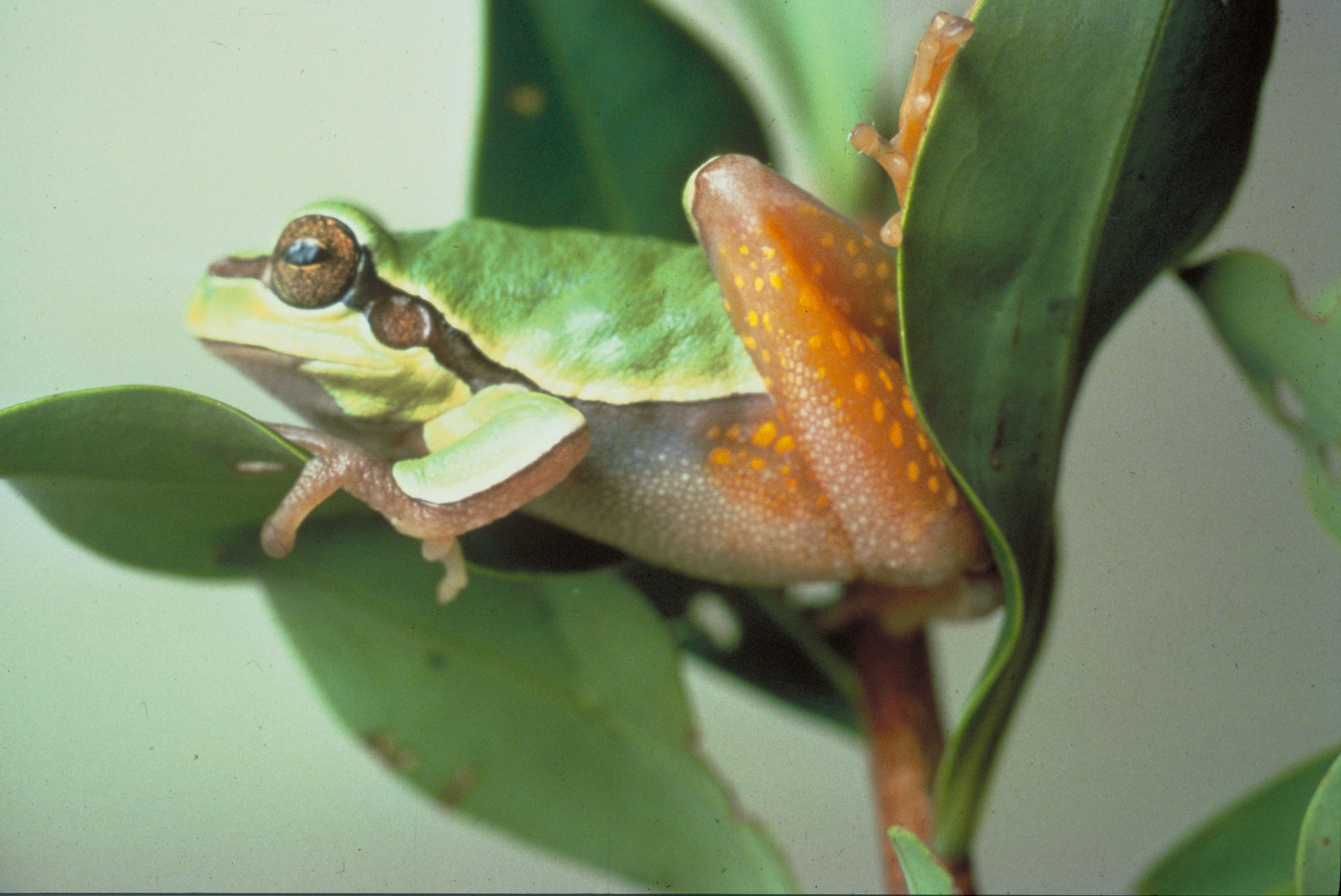 Pine Barrens Tree Frog (Hyla andersonii)